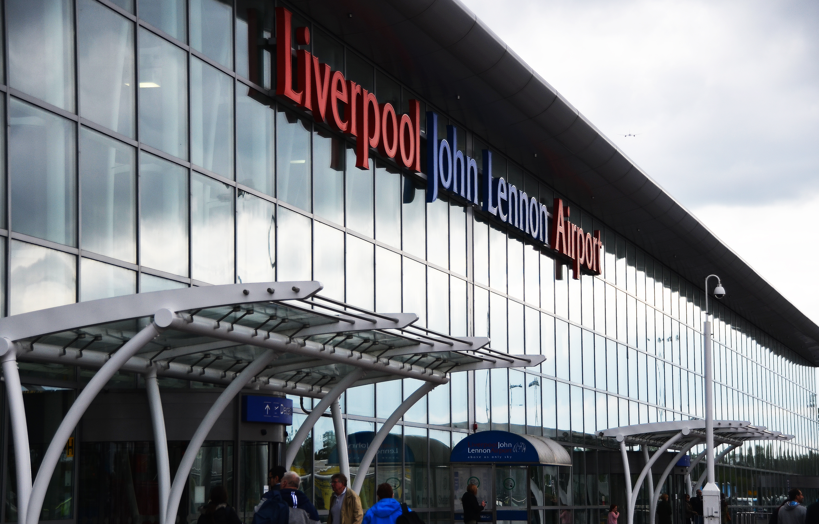 Eingangshalle Airport John Lennon Liverpool